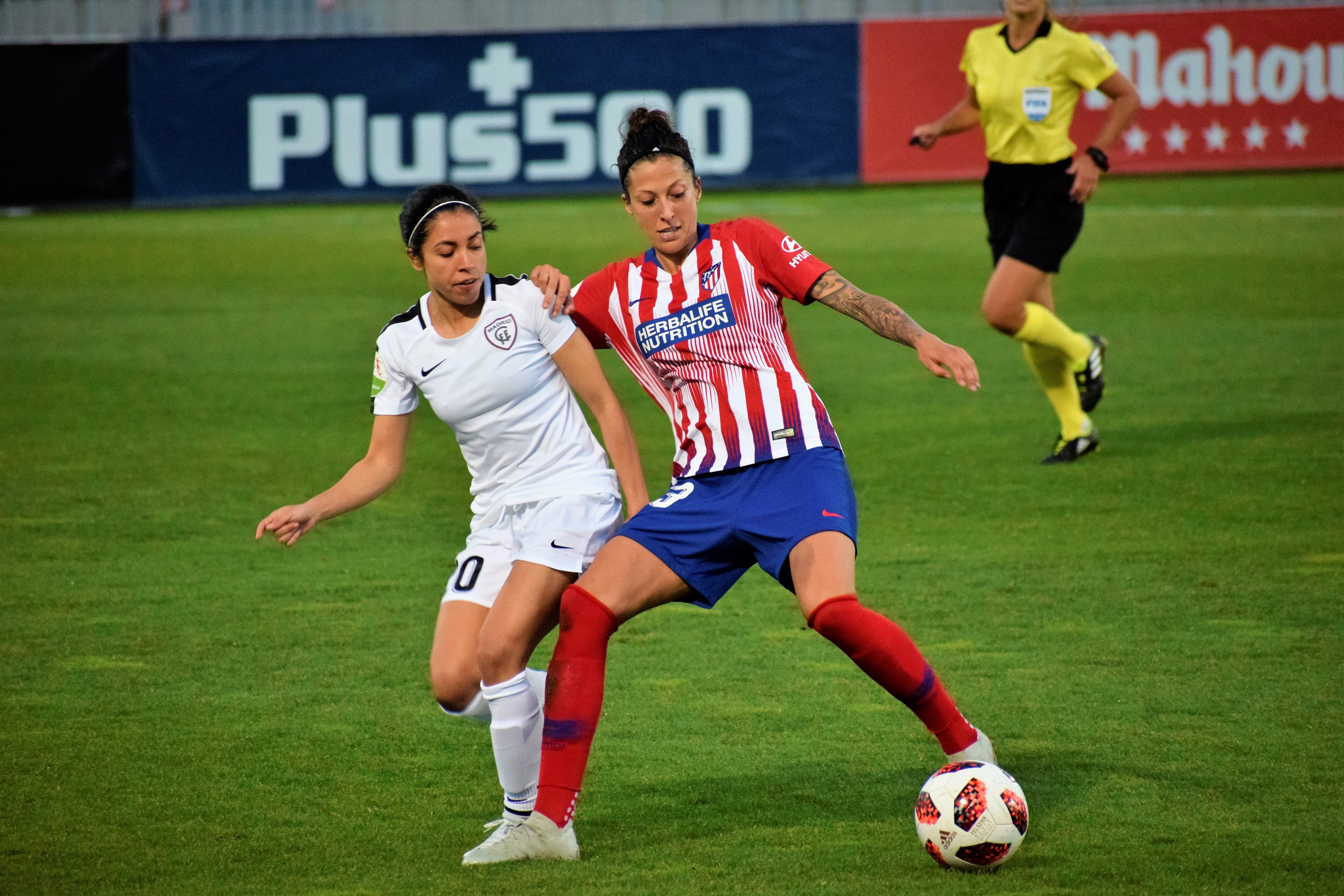 Jenni Hermoso jugando con el Atlético de Madrid